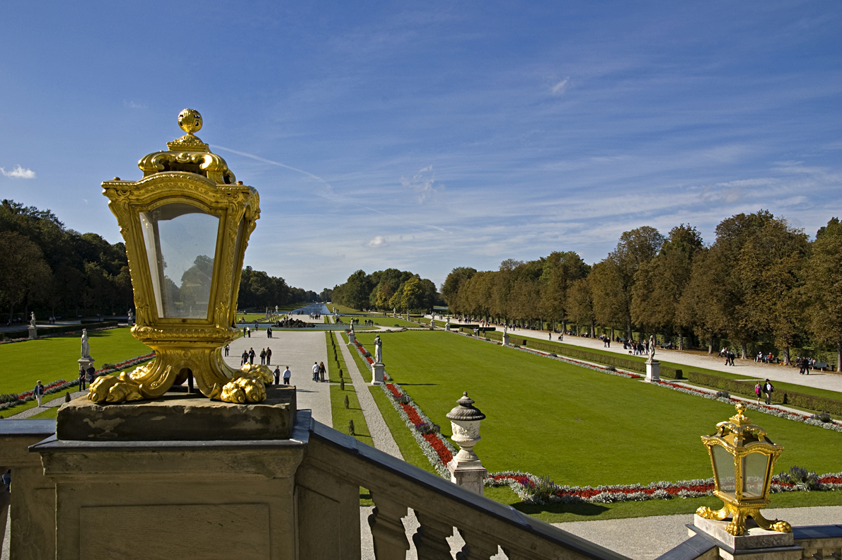 Schloss Nymphenburg - Blick vom Schloss in den Schlosspark - in Richtung Westen